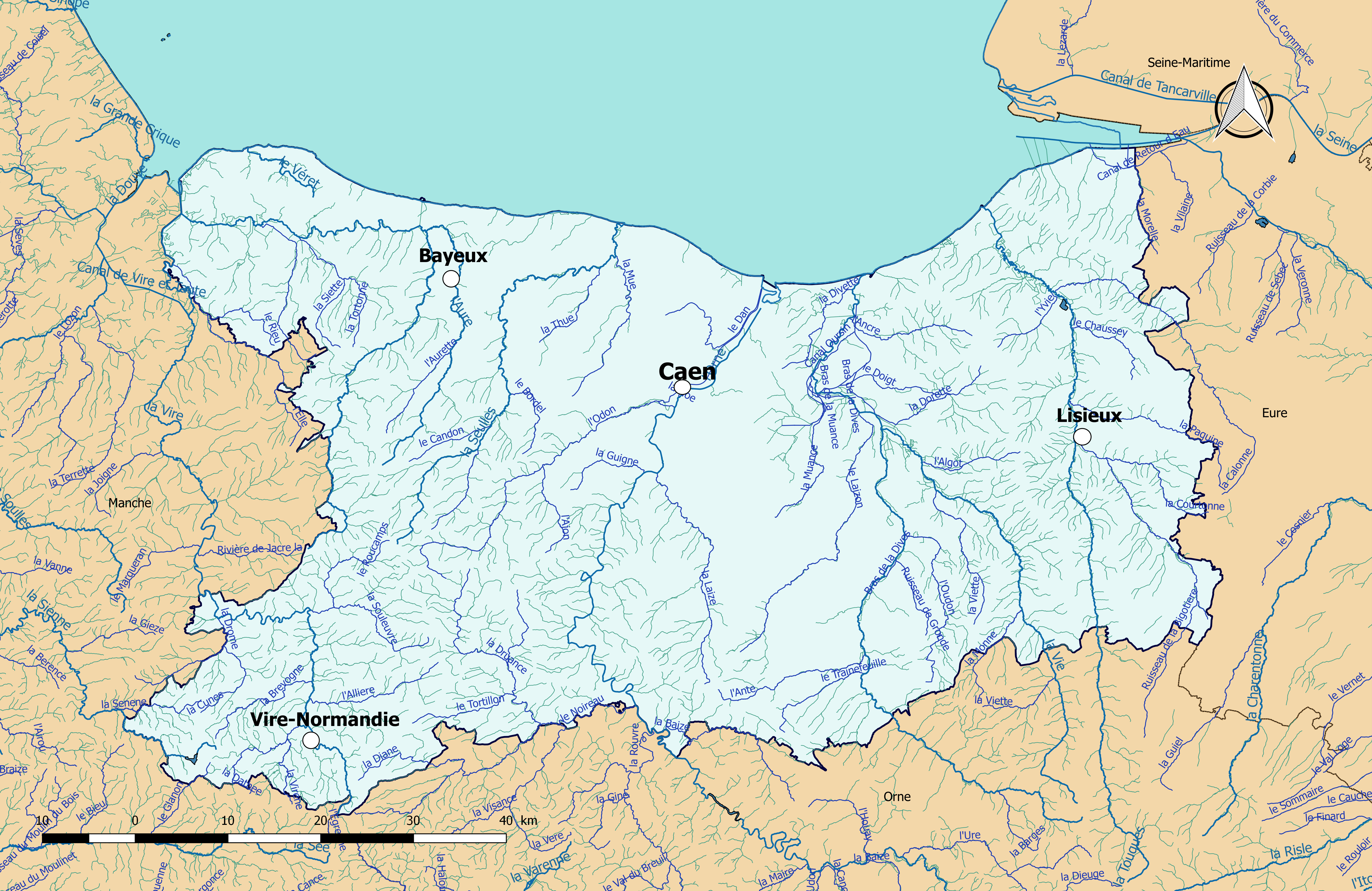 Carte du réseau hydrographique du département du Calvados (France)